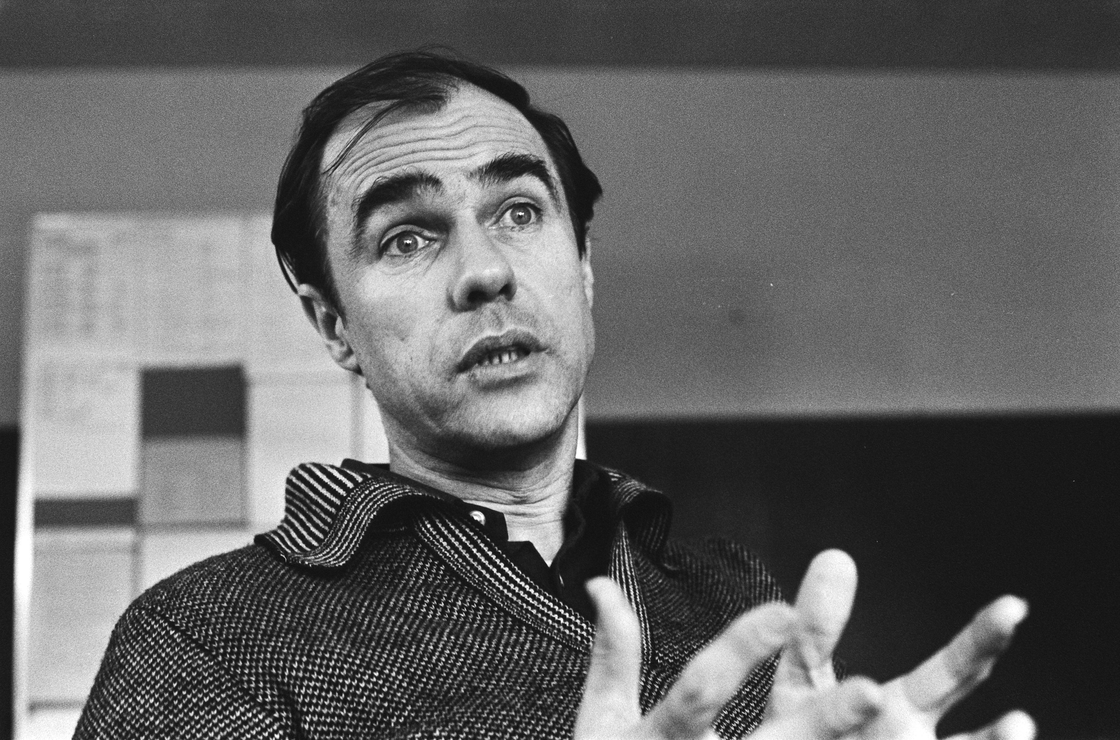 Collectie / Archief : Fotocollectie Anefo Reportage / Serie : [ onbekend ] Beschrijving : Erik Schneider , kop Datum : 12 januari 1977 Fotograaf : Verhoeff, Bert / Anefo Auteursrechthebbende : Nationaal Archief Materiaalsoort : Negatief (zwart/wit) Nummer archiefinventaris : bekijk toegang 2.24.01.05 Bestanddeelnummer : 928-9755 Reacties Geplaatst door Toneelliefhebber op 05 augustus 2016 - 17:27. Acteur Eric Schneider die de rol van Hamlet gaat spelen.